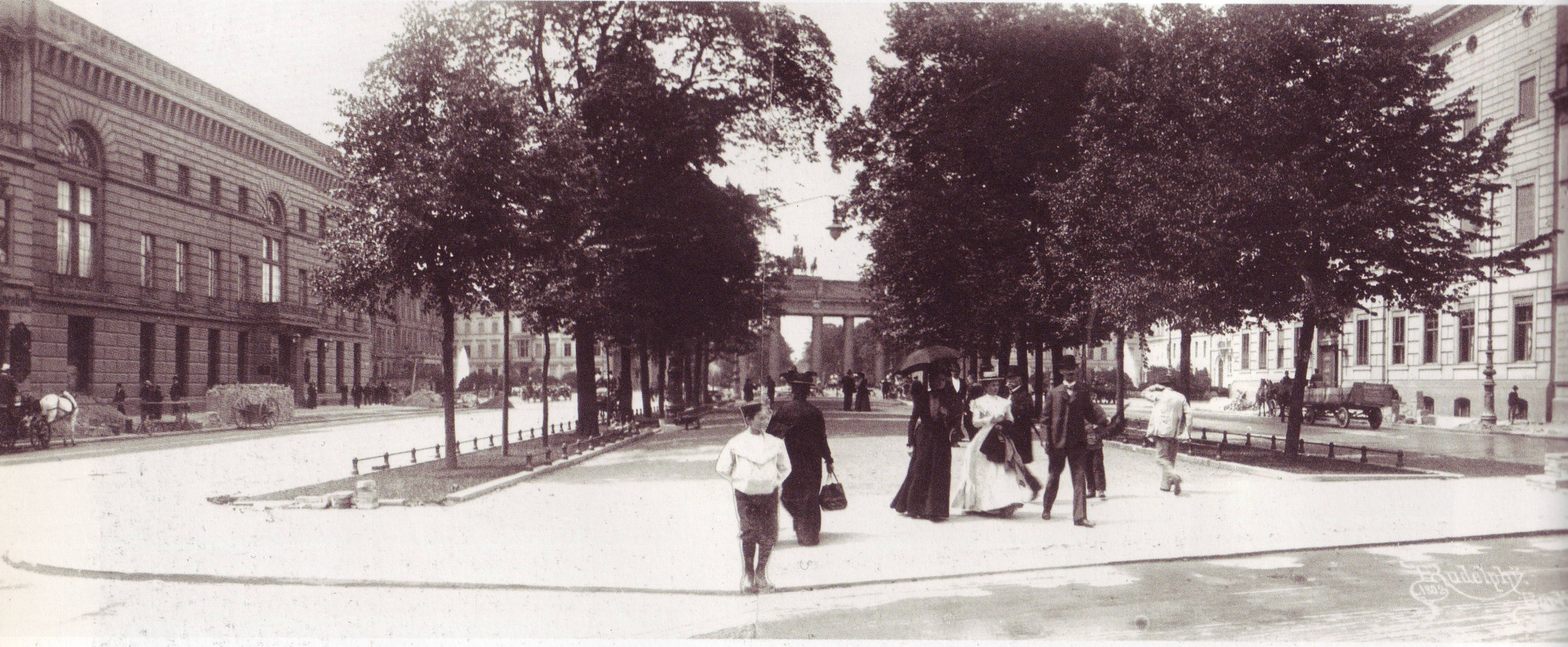 Unter den Linden with Brandenburg Gate in the background, Berlin, 1902